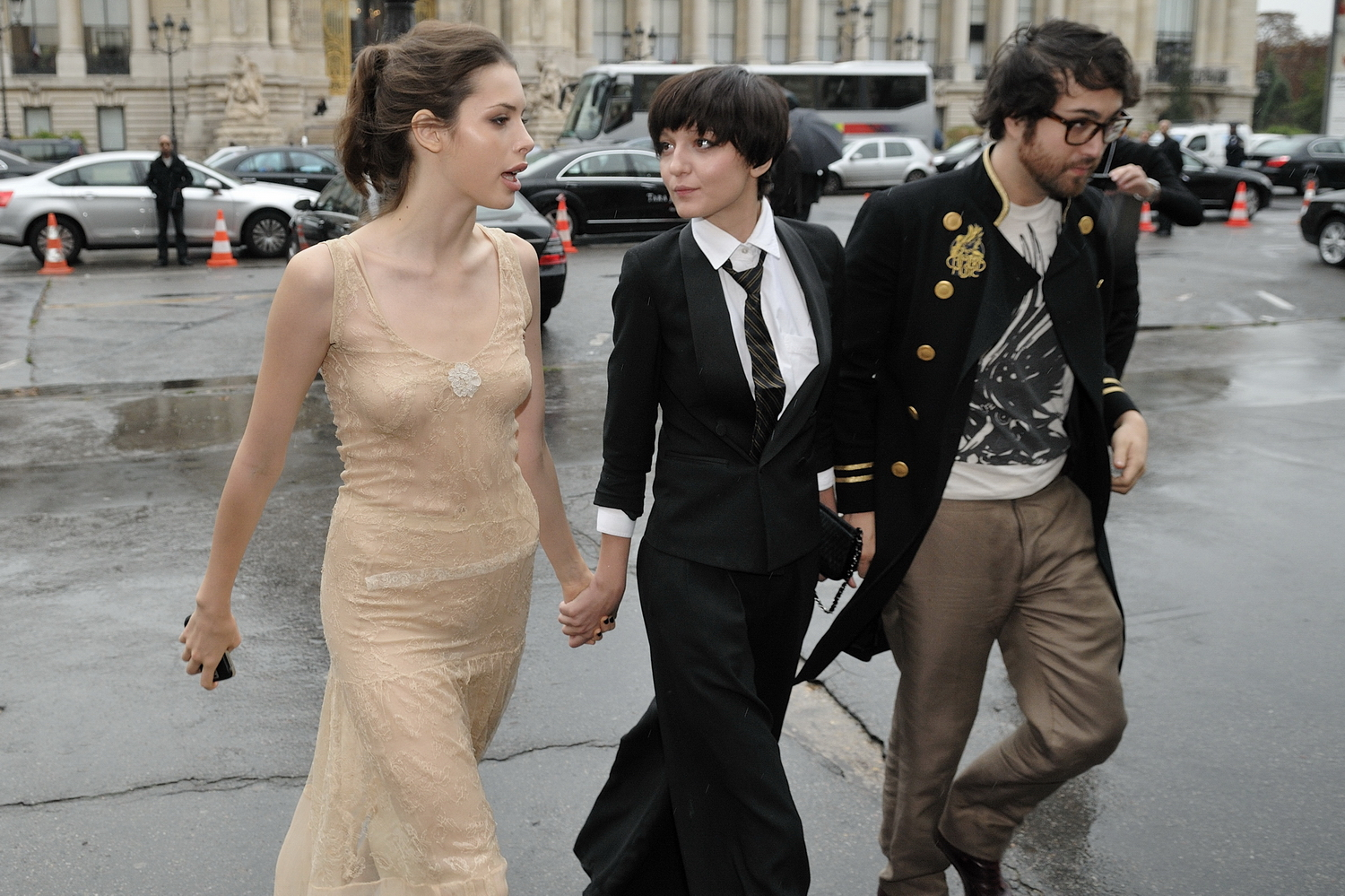 Défilé Chanel printemps/été 2010 prêt-à-porter au Grand Palais (Avenue Winston-Churchill - Paris 75008)